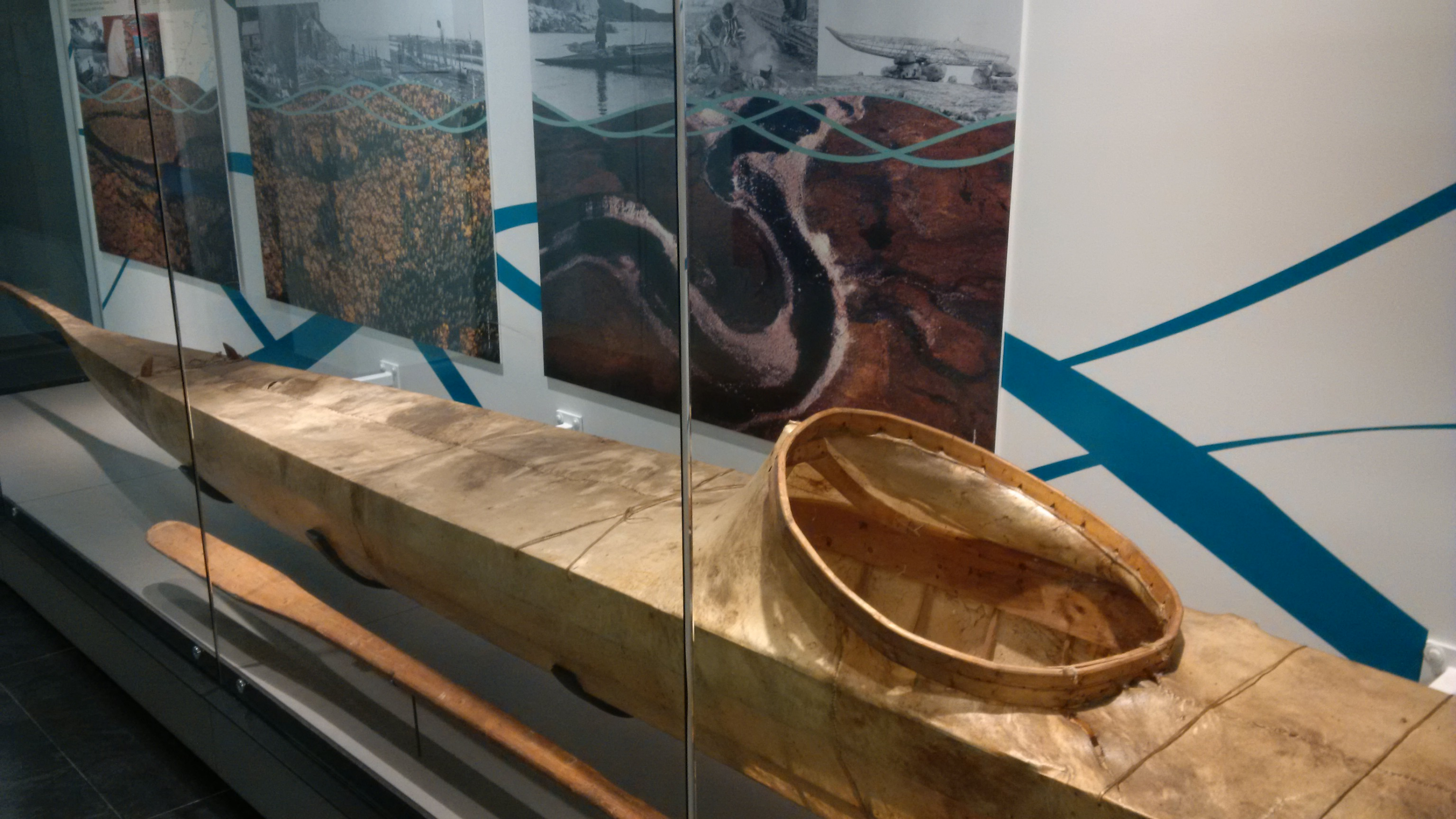 Kayak des Inuits du Caribou, en peau de phoque, 1966. Exposé à l'université de Montréal